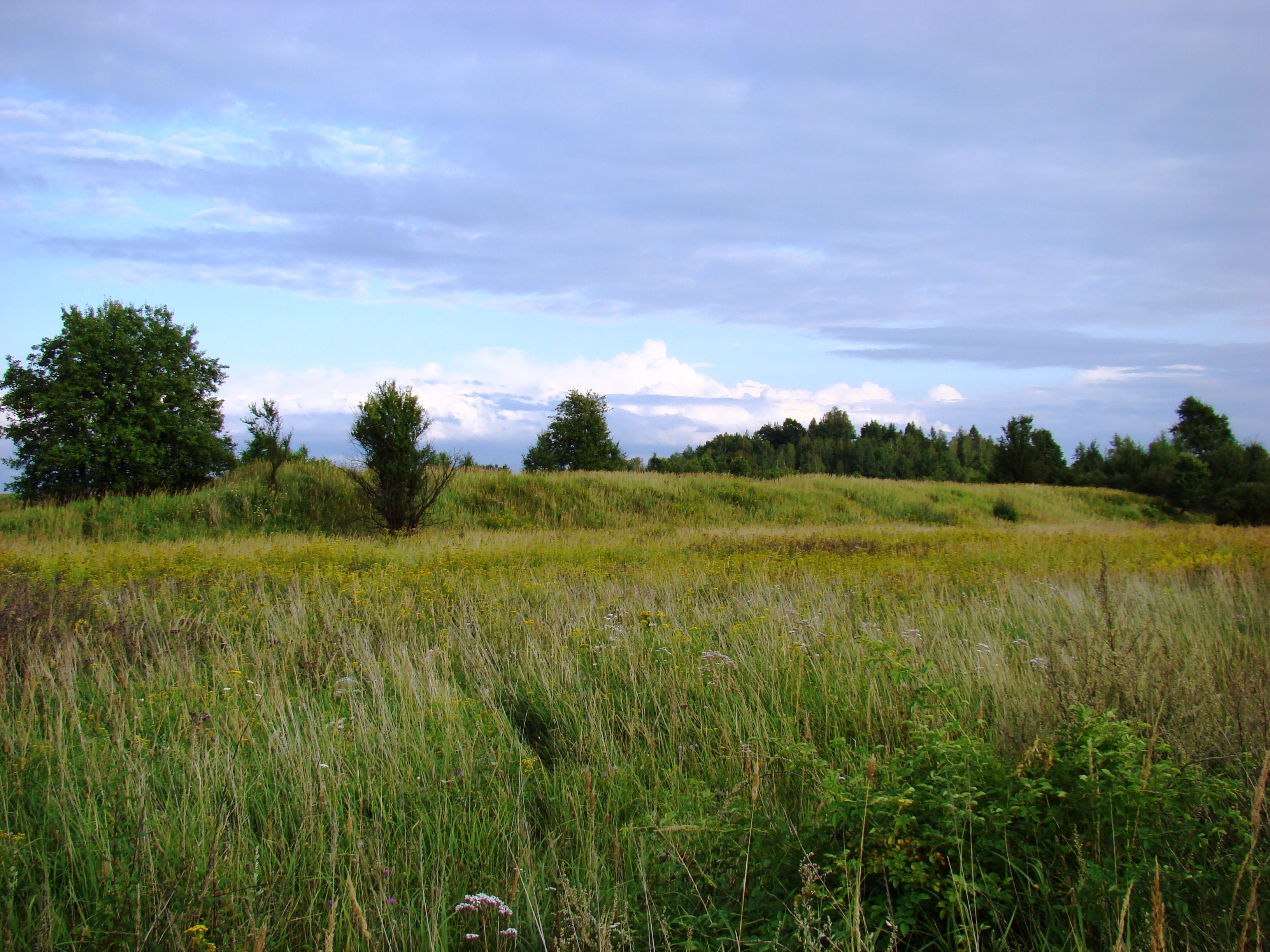 Pozostałości hałdy kopalni rud żelaza "Franciszek stary" w okolicach Liszki Dolnej